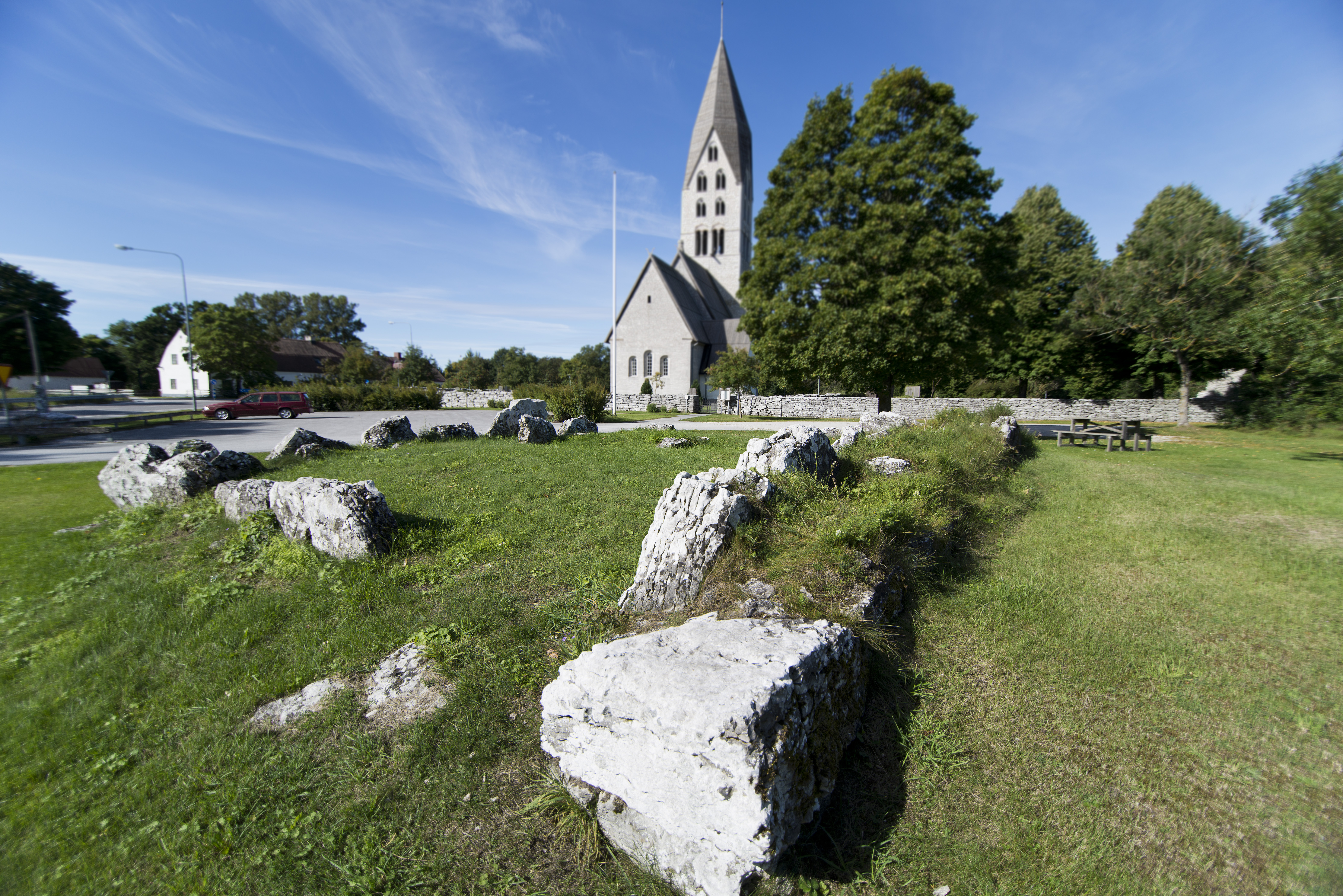 Husgrund vid Tingstäde kyrka